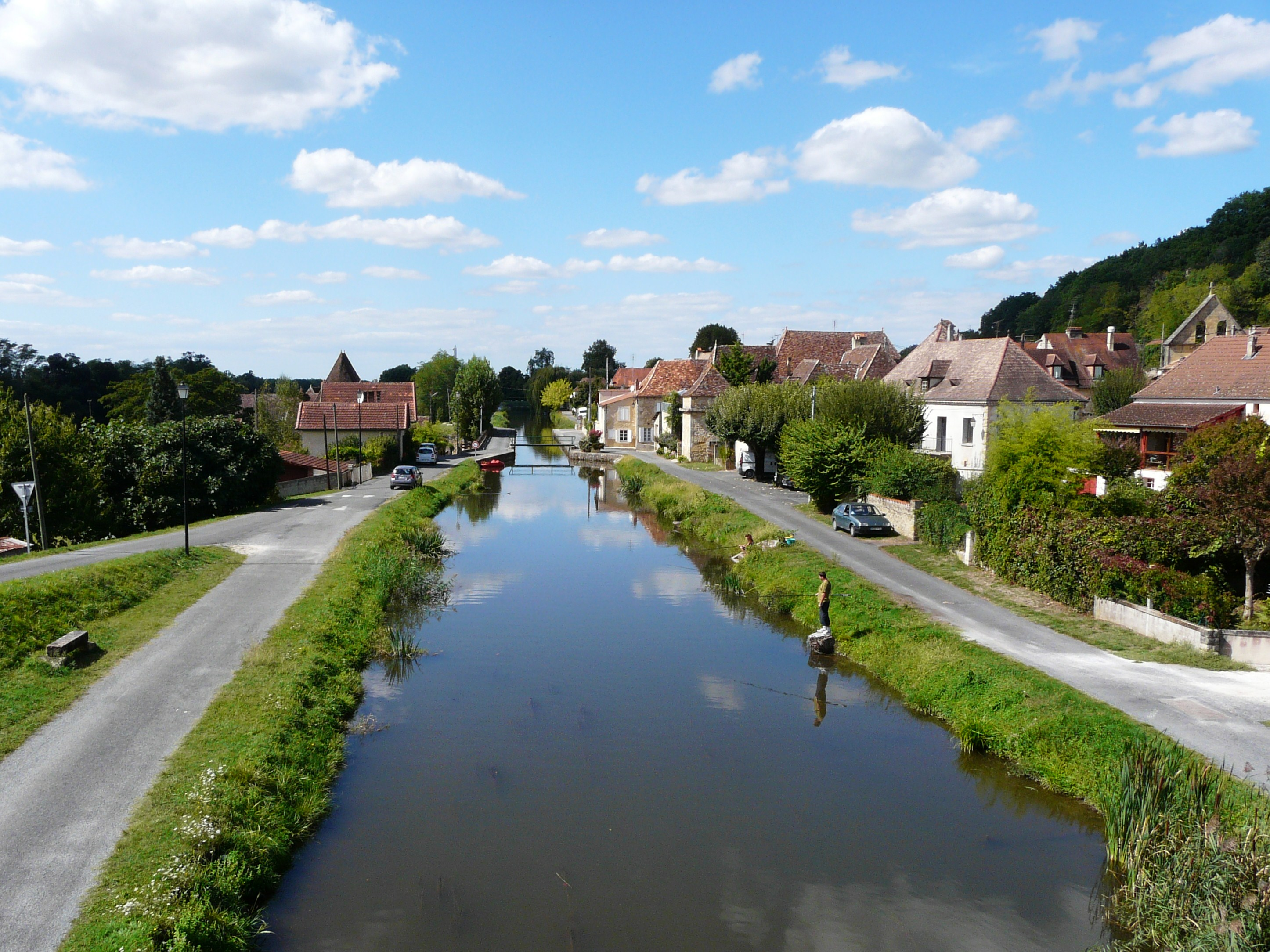 Le canal de Lalinde vu vers l'aval au bourg de Saint-Capraise-de-Lalinde, Dordogne, France.